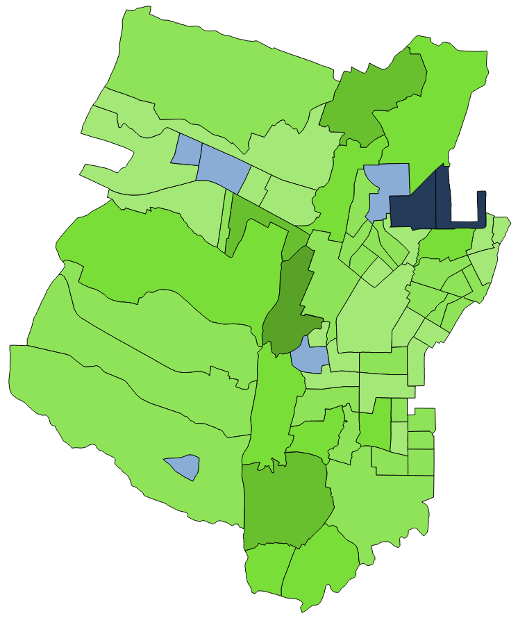 顏色對照表